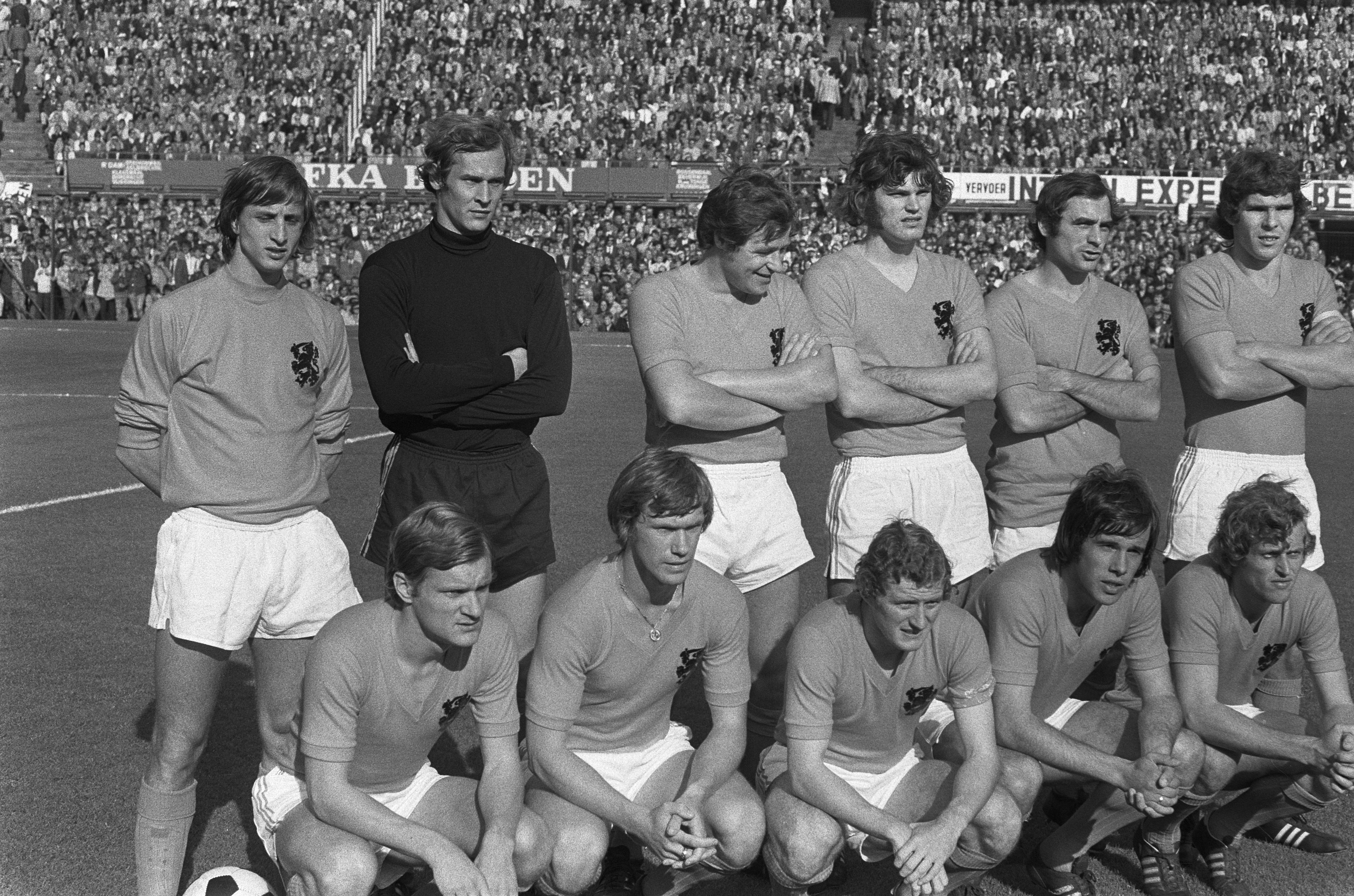 Collectie / Archief : Fotocollectie Anefo Reportage / Serie : [ onbekend ] Beschrijving : Nederland tegen Oost Duitsland 3-2, Nederlands elftal Datum : 10 oktober 1971 Locatie : D.D.R., Duitsland, Nederland Trefwoorden : elftallen, sport, voetbal Fotograaf : Verhoeff, Bert / Anefo Auteursrechthebbende : Nationaal Archief Materiaalsoort : Negatief (zwart/wit) Nummer archiefinventaris : bekijk toegang 2.24.01.05 Bestanddeelnummer : 925-0346